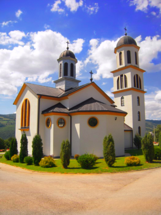 Hram Sv. cara Konstantina i carice Jelene (Bočac)